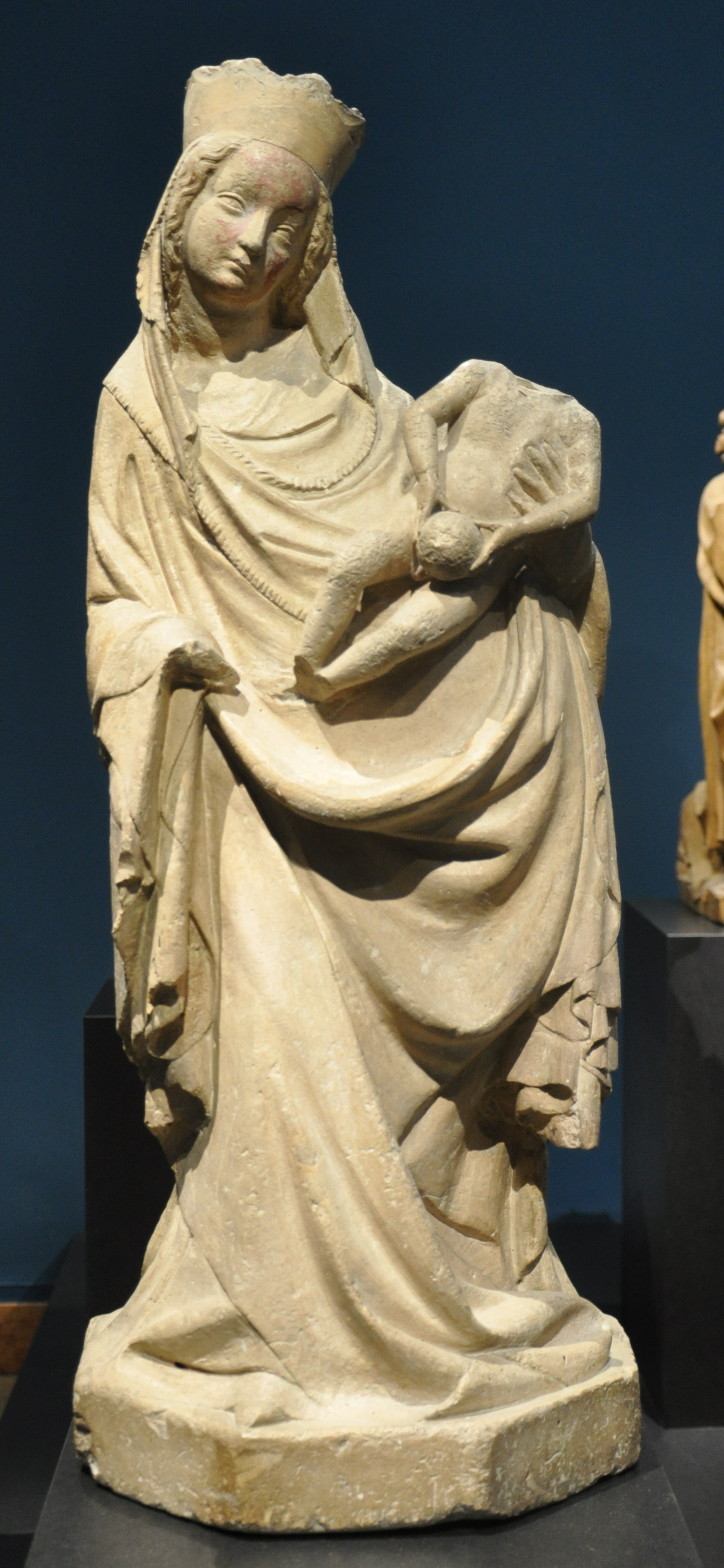 Muttergottes; Salzburg, um 1410–1420; Steinguss, geringe Spuren farbiger Fassung Liebieghaus, Frankfurt am Main, Inv. Nr. 1066 (angeblich aus dem oberen Ennstal in der Steiermark)